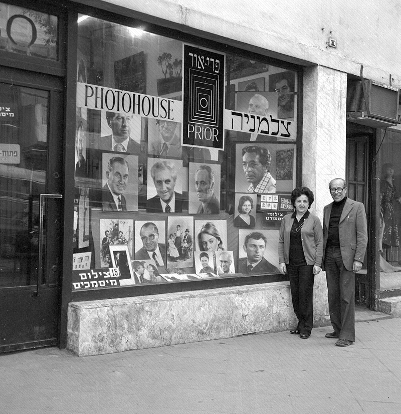 רודי ומירים ויסנשטין בפתח הצלמניה, 1979